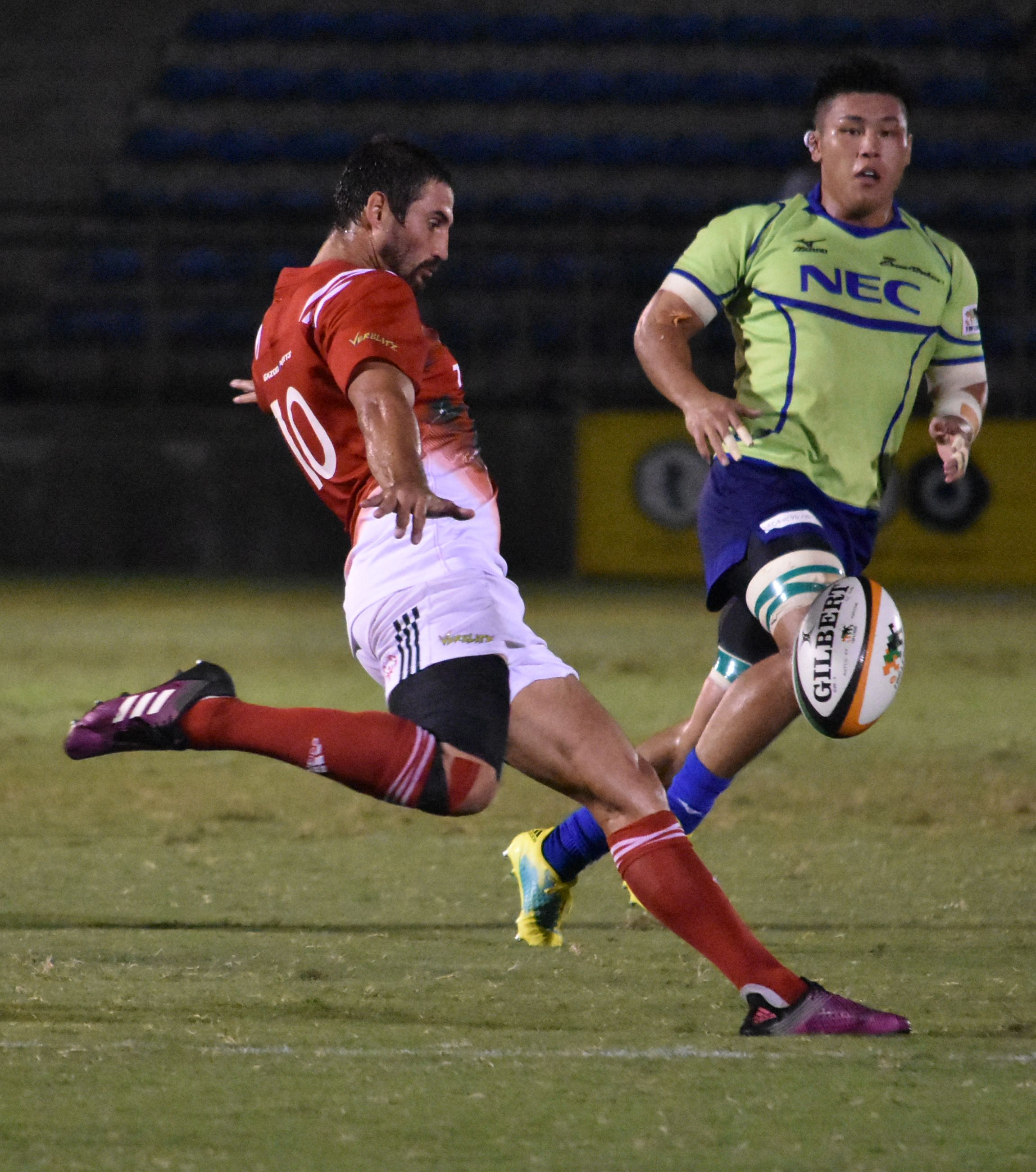 ライオネル・クロニエ